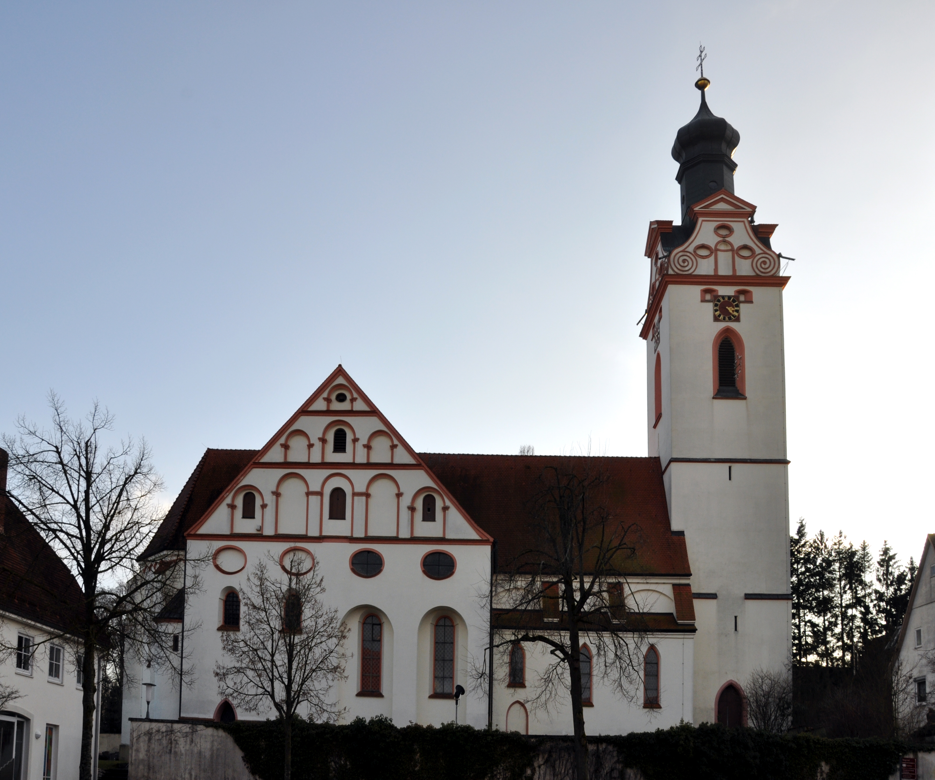 Oberstadion (Alb-Donau-Kreis), Pfarrkirche St. Martinus, Außenansicht von Norden